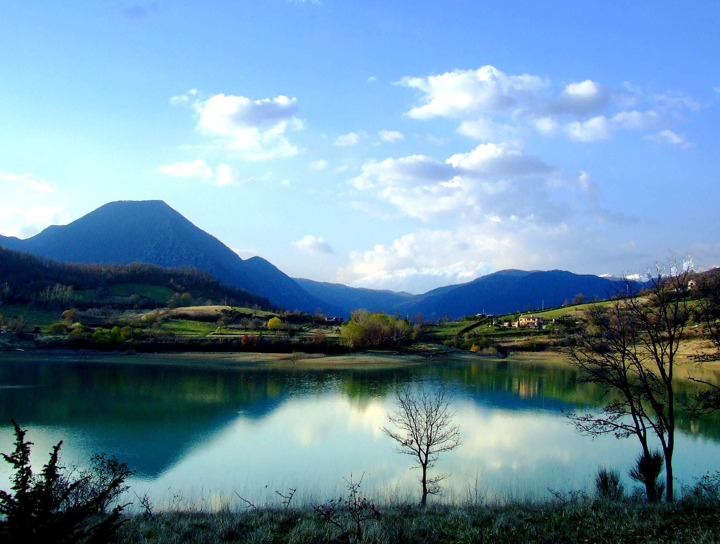 Veduta primaverile del lago artificiale di Castel San Vincenzo